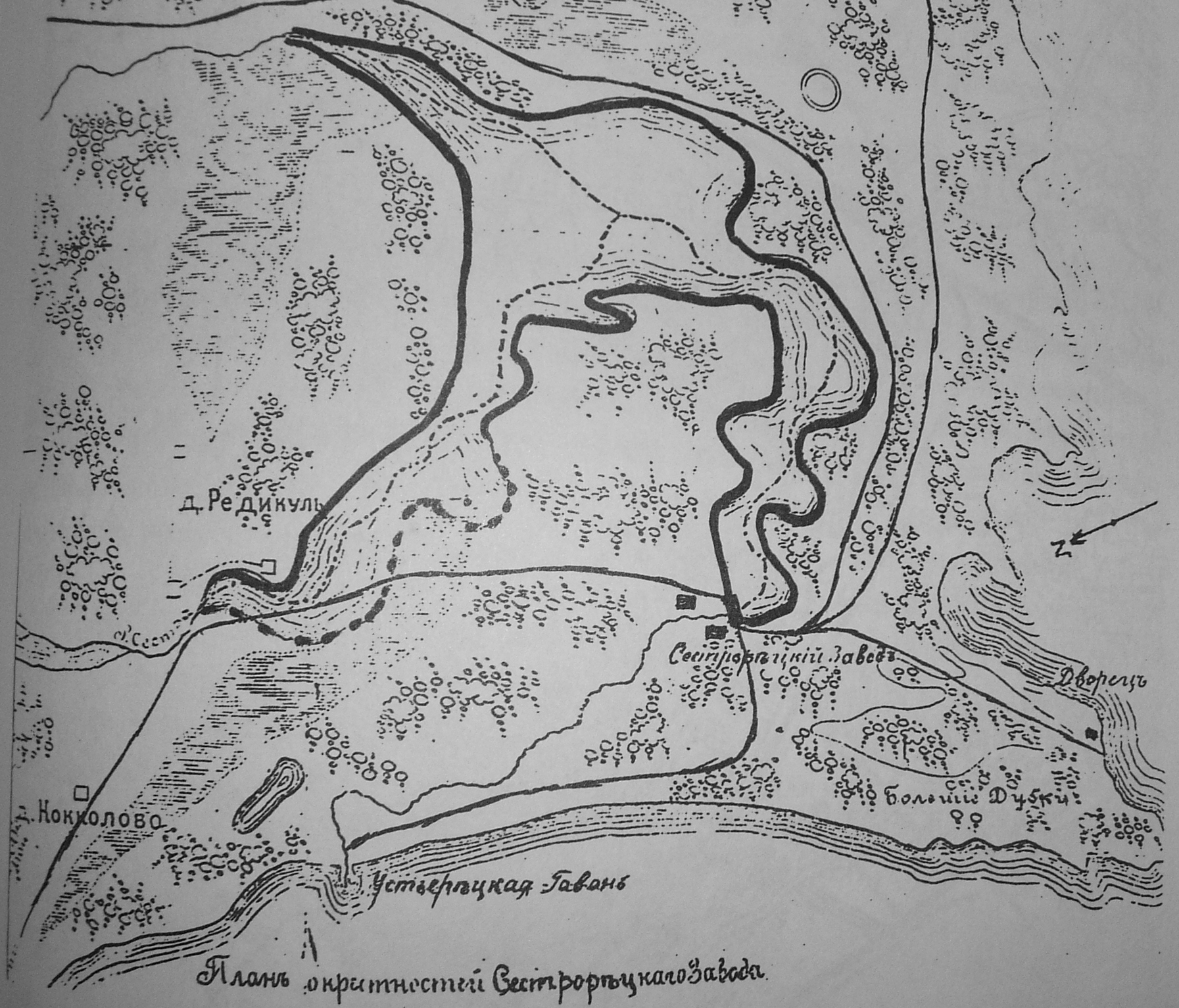 План окрестностей Сестрорецкого завода.